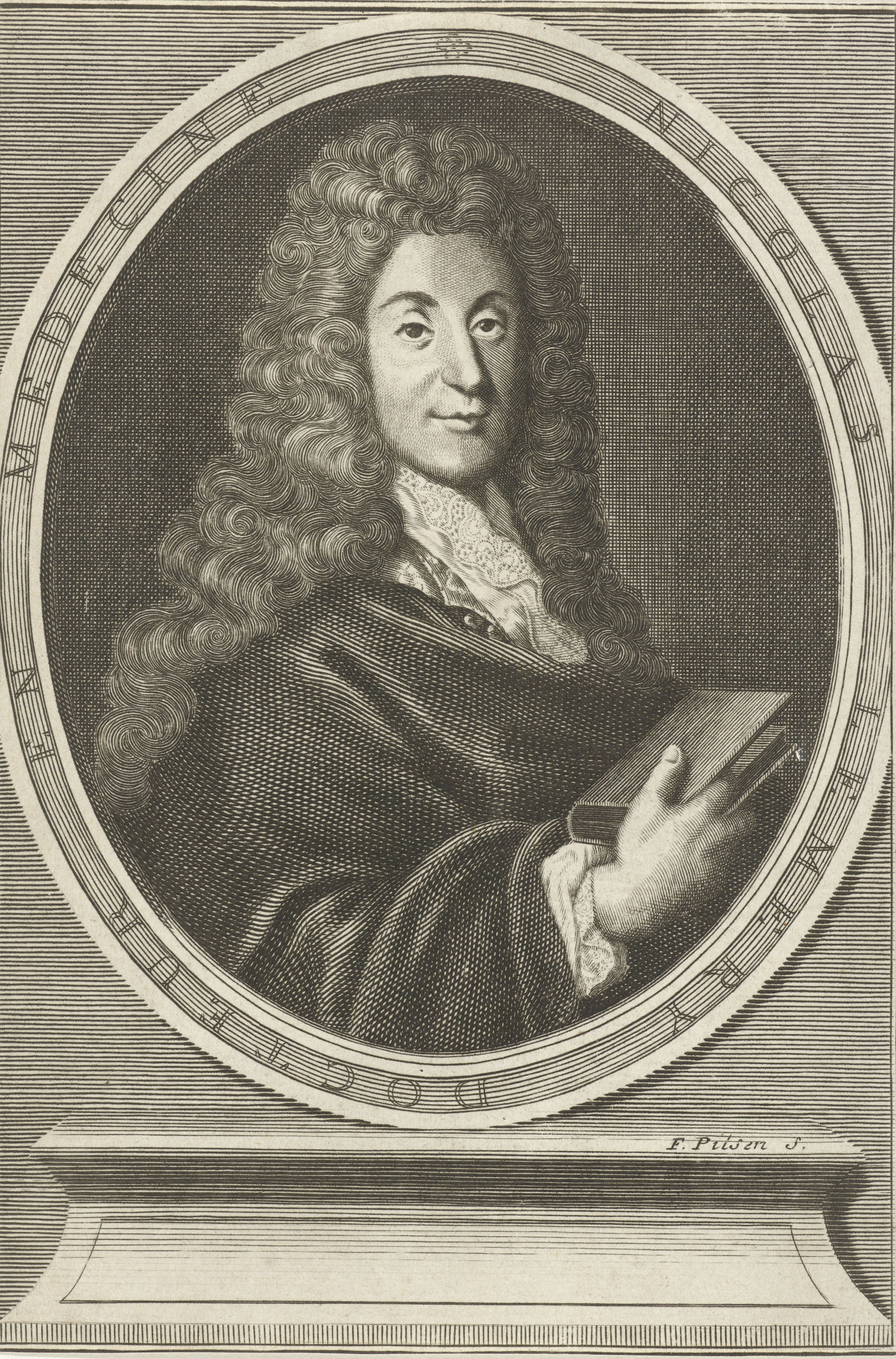 IdentificatieTitel(s): Portret van de Franse chemicus Nicolas LemeryObjecttype: prent Objectnummer: RP-P-1910-4430Opschriften / Merken: verzamelaarsmerk, verso, gestempeld: Lugt 2228VervaardigingVervaardiger: prentmaker: Frans Pilsen (vermeld op object)Plaats vervaardiging: GentDatering: 1710 - 1784Fysieke kenmerken: gravureMateriaal: papier Techniek: graveren (drukprocedé)Afmetingen: blad: h 153 mm × b 103 mmOnderwerpWat: bookWie: Nicolas Lemery (1645-1715)Verwerving en rechtenVerwerving: aankoop 1905Copyright: Publiek domein